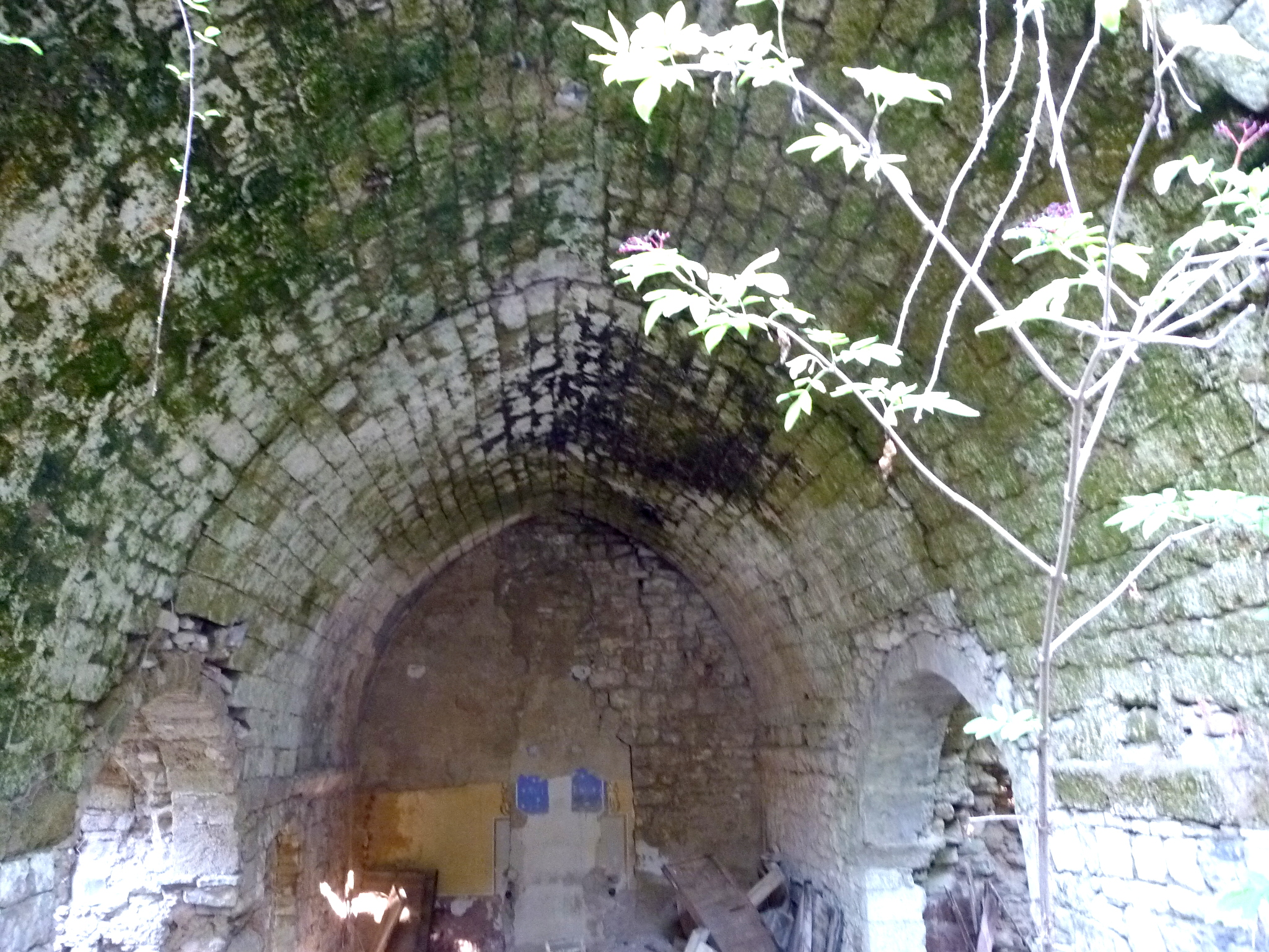 Església de Sant Vicenç de Castellar del Riu: volta interior